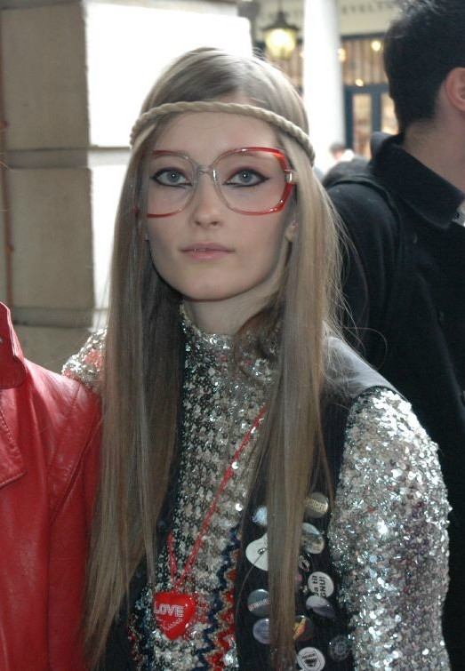 Iekeliene Stange